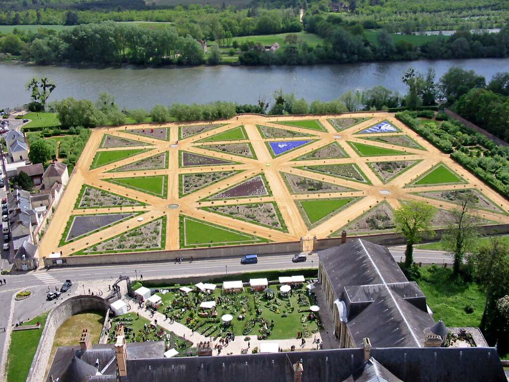 Potager du château de La Roche-Guyon (Val-d'Oise) en 2005, vue prise depuis le sommet du donjon